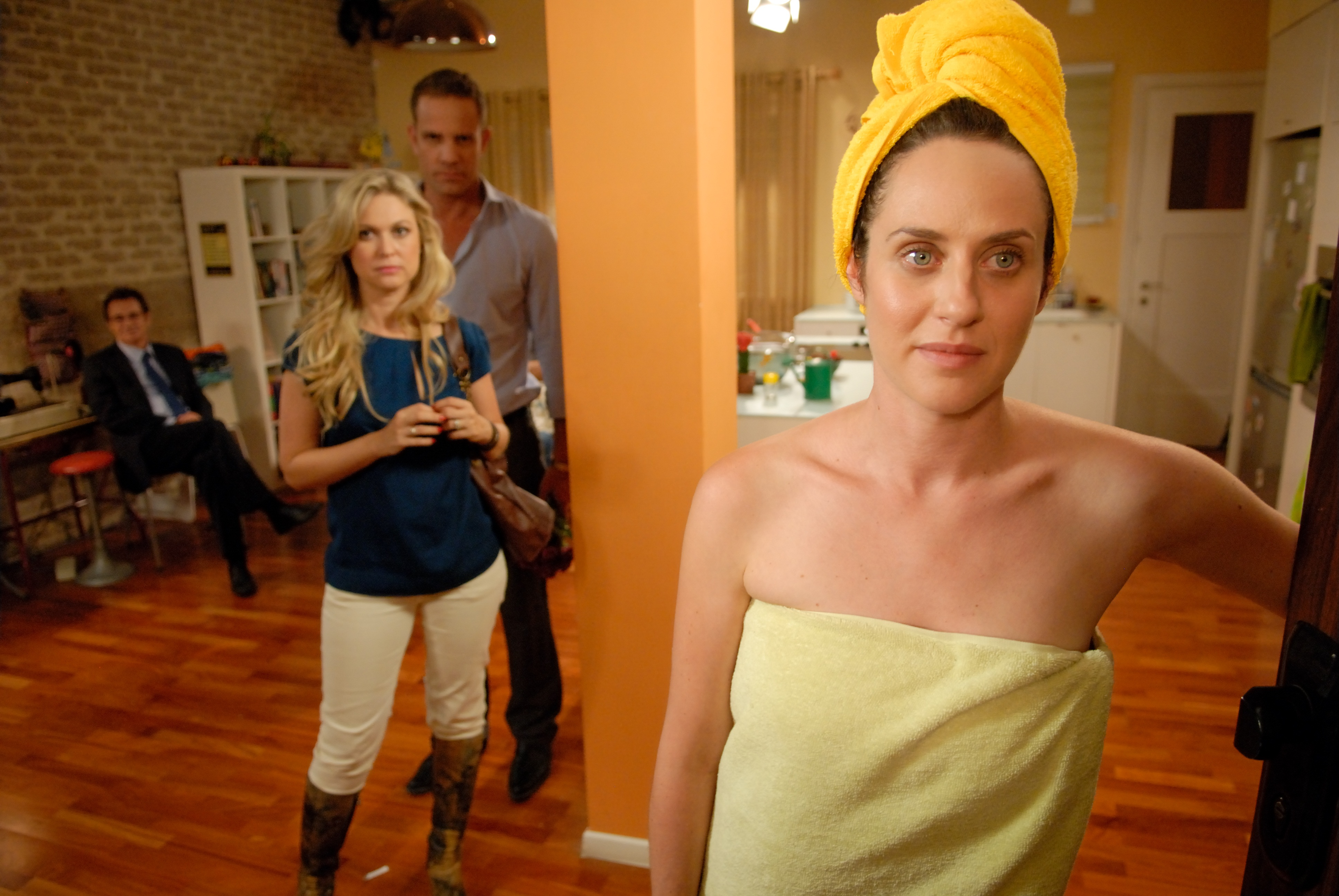 מימין: יעל טוקר, מיקי לאון: ומיכל ינאי, בסרטו של דובר קוסאשווילי "רווקה פלוס"